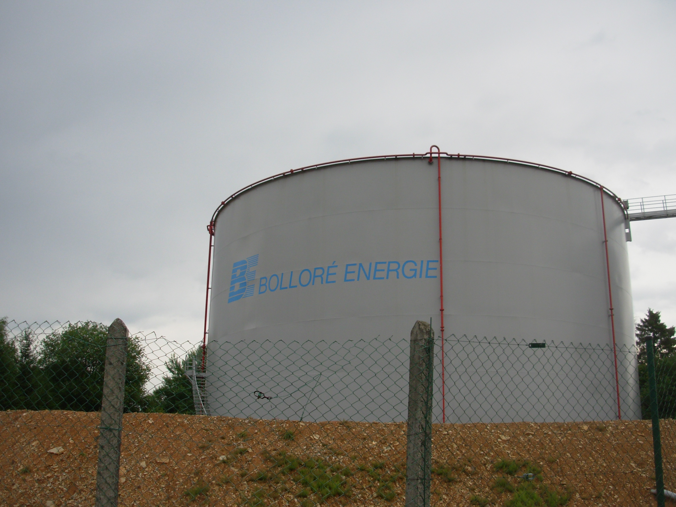 Bolloré Énergie